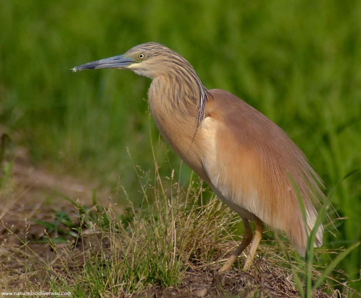 Sgarza ciuffetto (Ardeola ralloides)